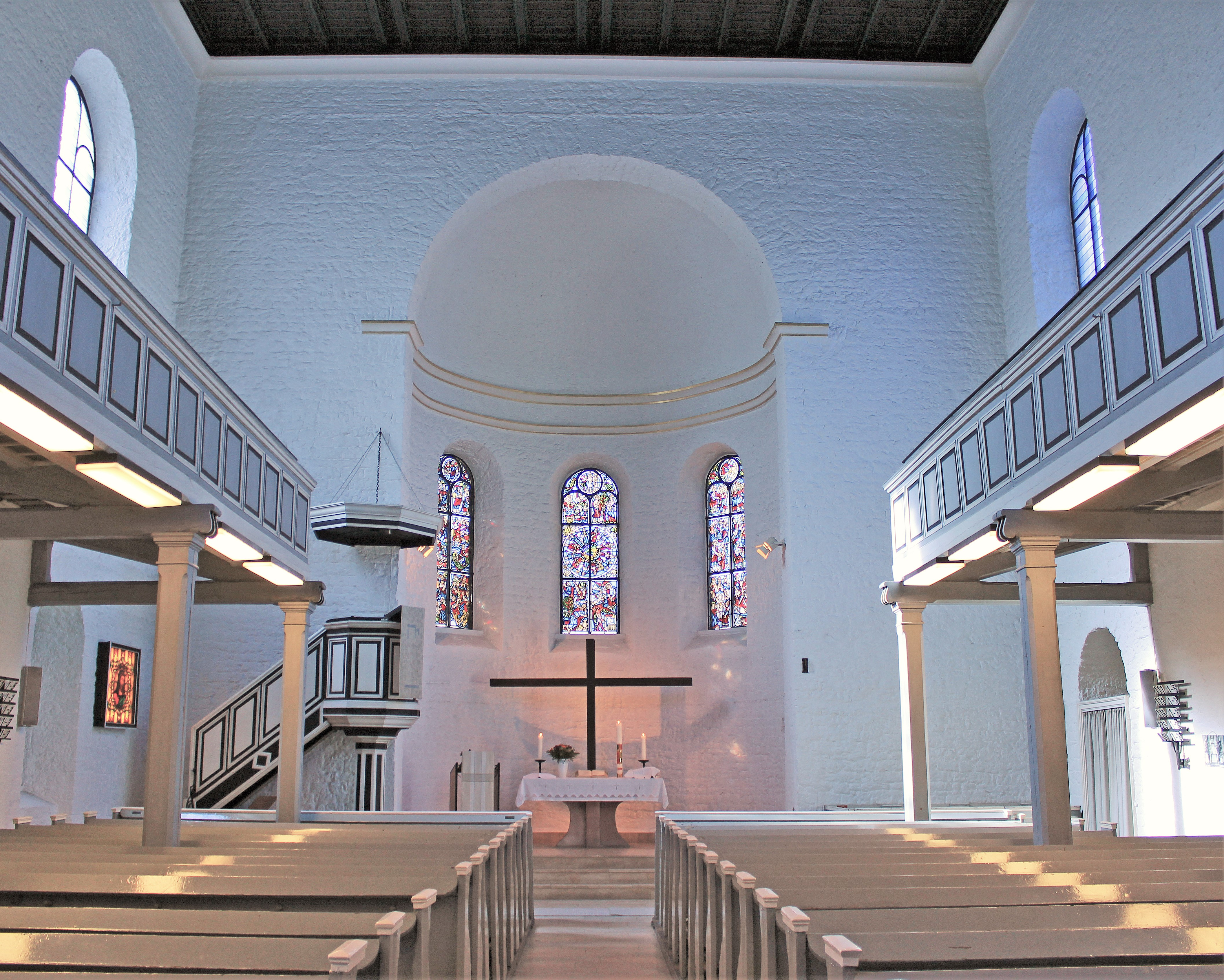 Blick ins Innere der Evangelischen Kirche in Wiebelskirchen, einem Stadtteil von Neunkirchen, Saarland.